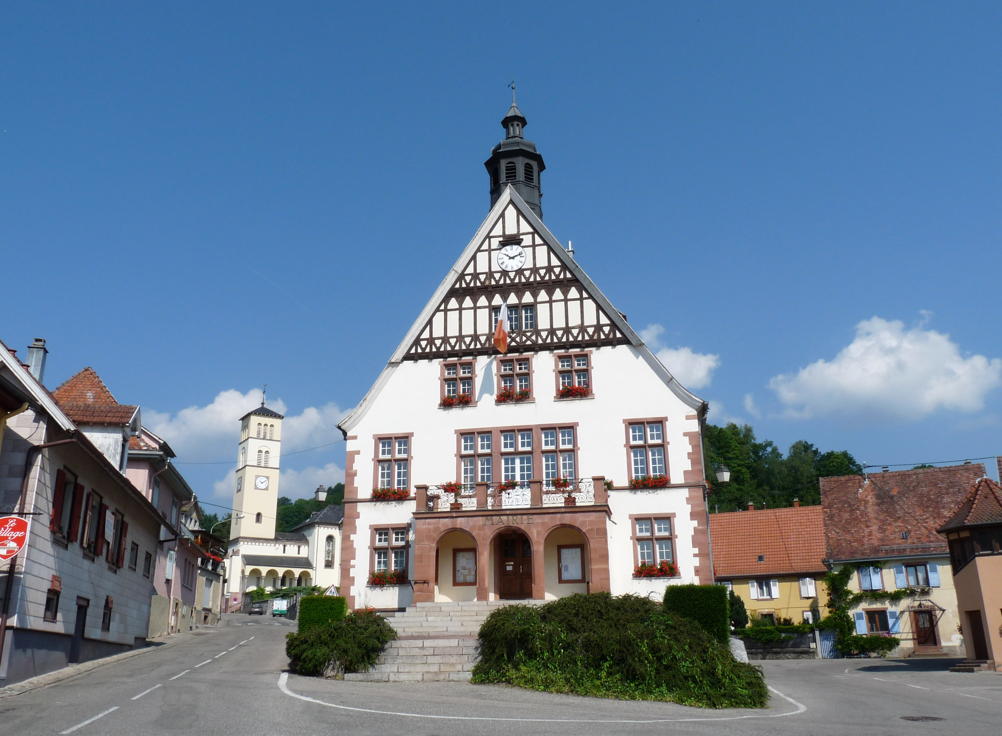 Eglise protestante et mairie à Stosswihr (Haut-Rhin)